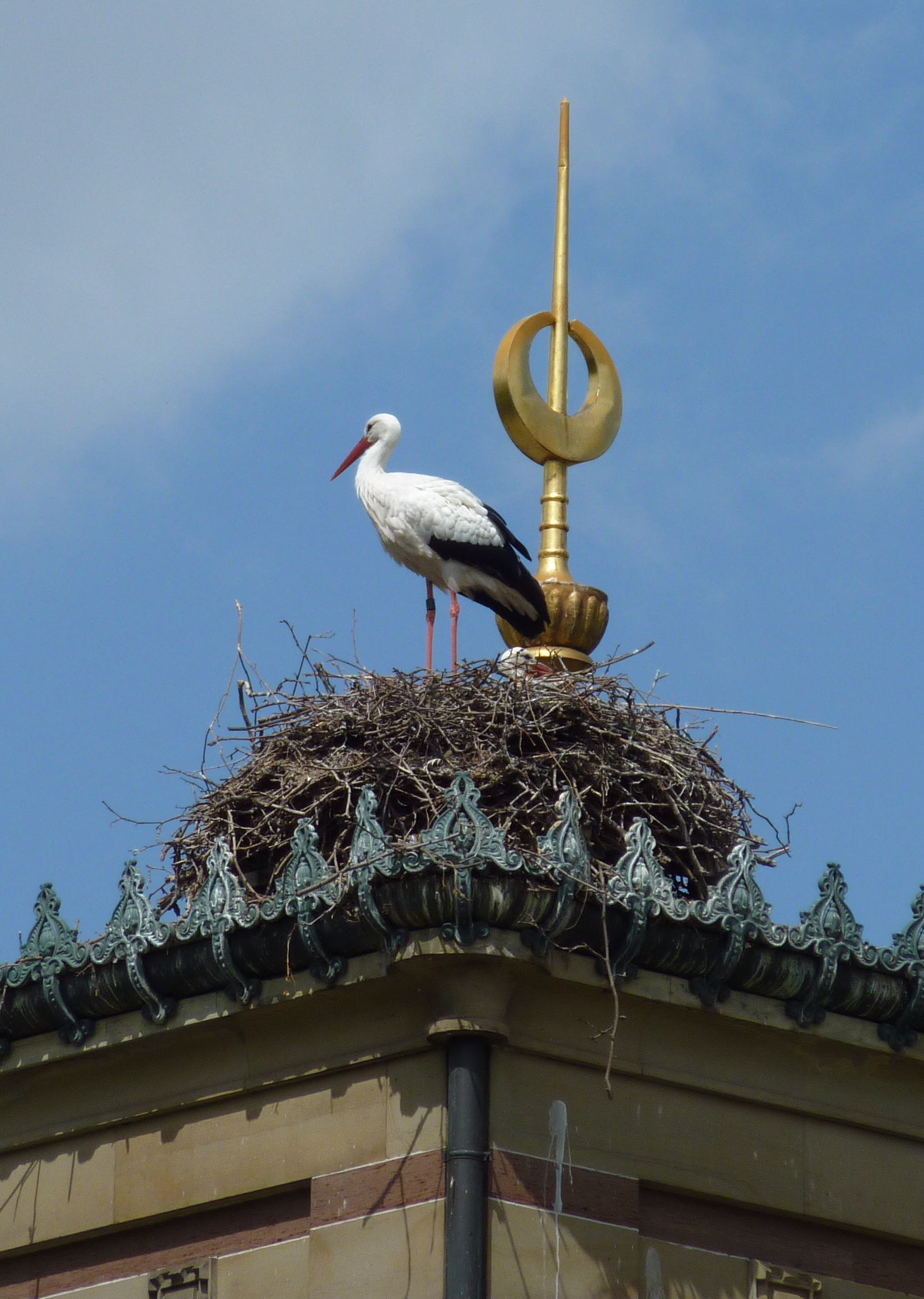 Storch auf der Damaszenerhalle der Wilhelma